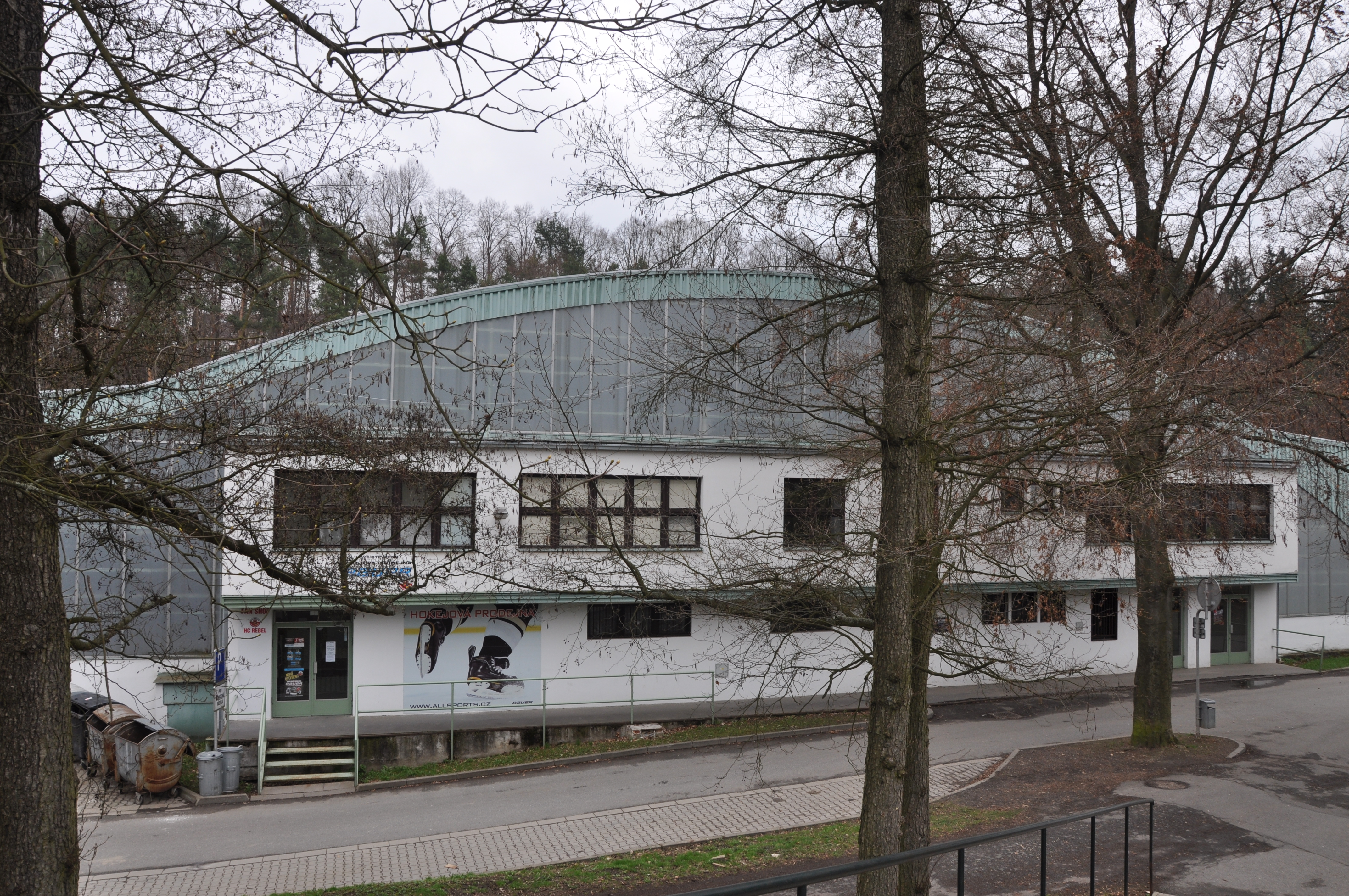 Sportovní areál Kotlina Havlíčkův Brod. Skládá se z několika budov. Zimní stadion(restaurace,ubytovna,bufety,ledová plocha a strojovna chlazení).Plavecký bazén(sauna,bufet,posilovna,tělocvična,SQUASH sály).Parkoviště a umělecká díla. Celý areál je zakomponován do místního parku Budoucnost. Okolo areálu protéká Cihlářský potok a částí i pod areálem. Najdeme ho mezi ulicí U Stadionu a ulice U Trojice. Město Havlíčkův Brod. Kraj Vysočina. Czech Republik.Autor textu Pohled 111.